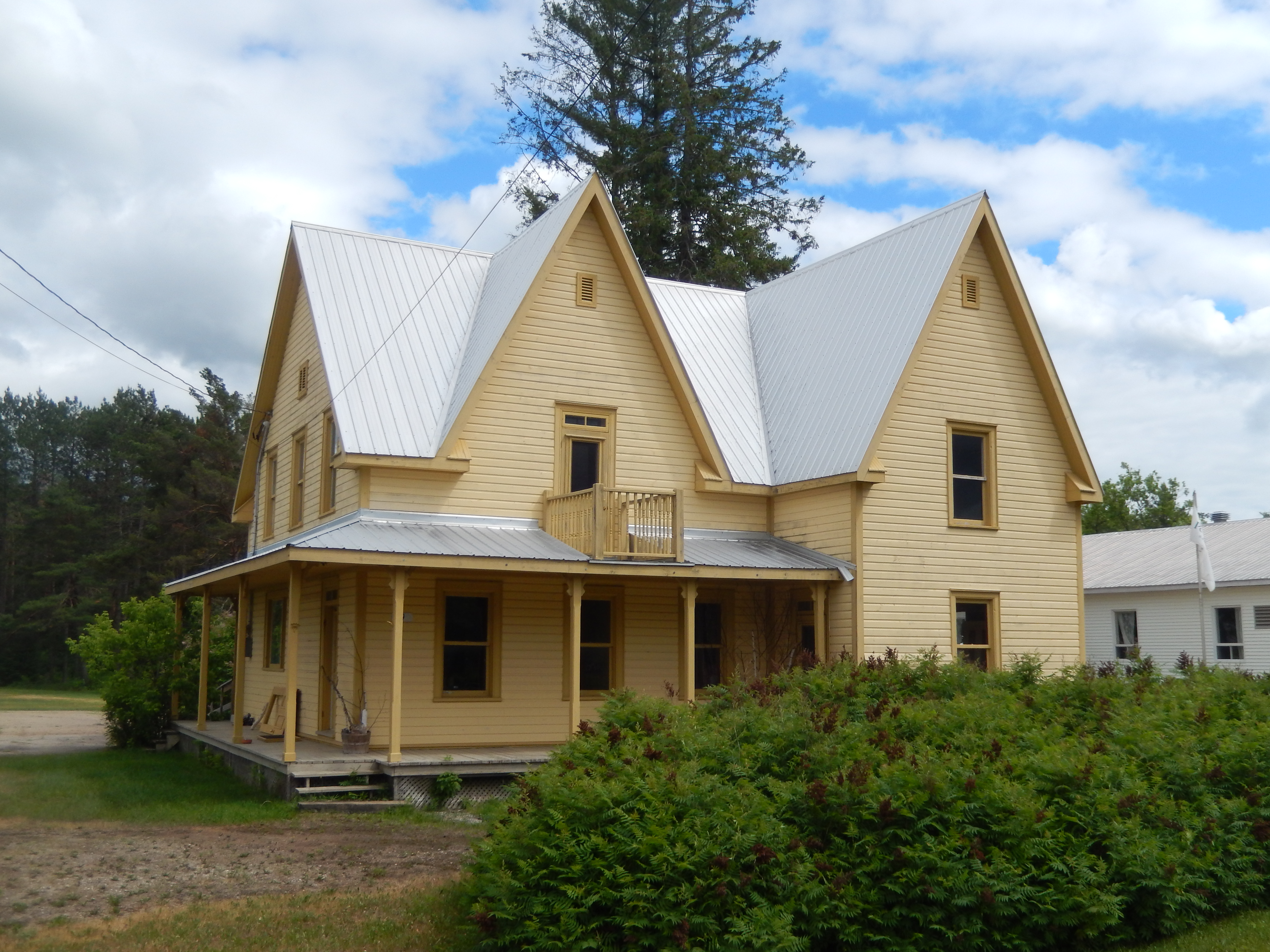 Ancien presbytère de Notre-Dame-de-la-Consolation en juin 2020.